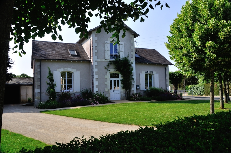 Marie de Francillon (Indre)